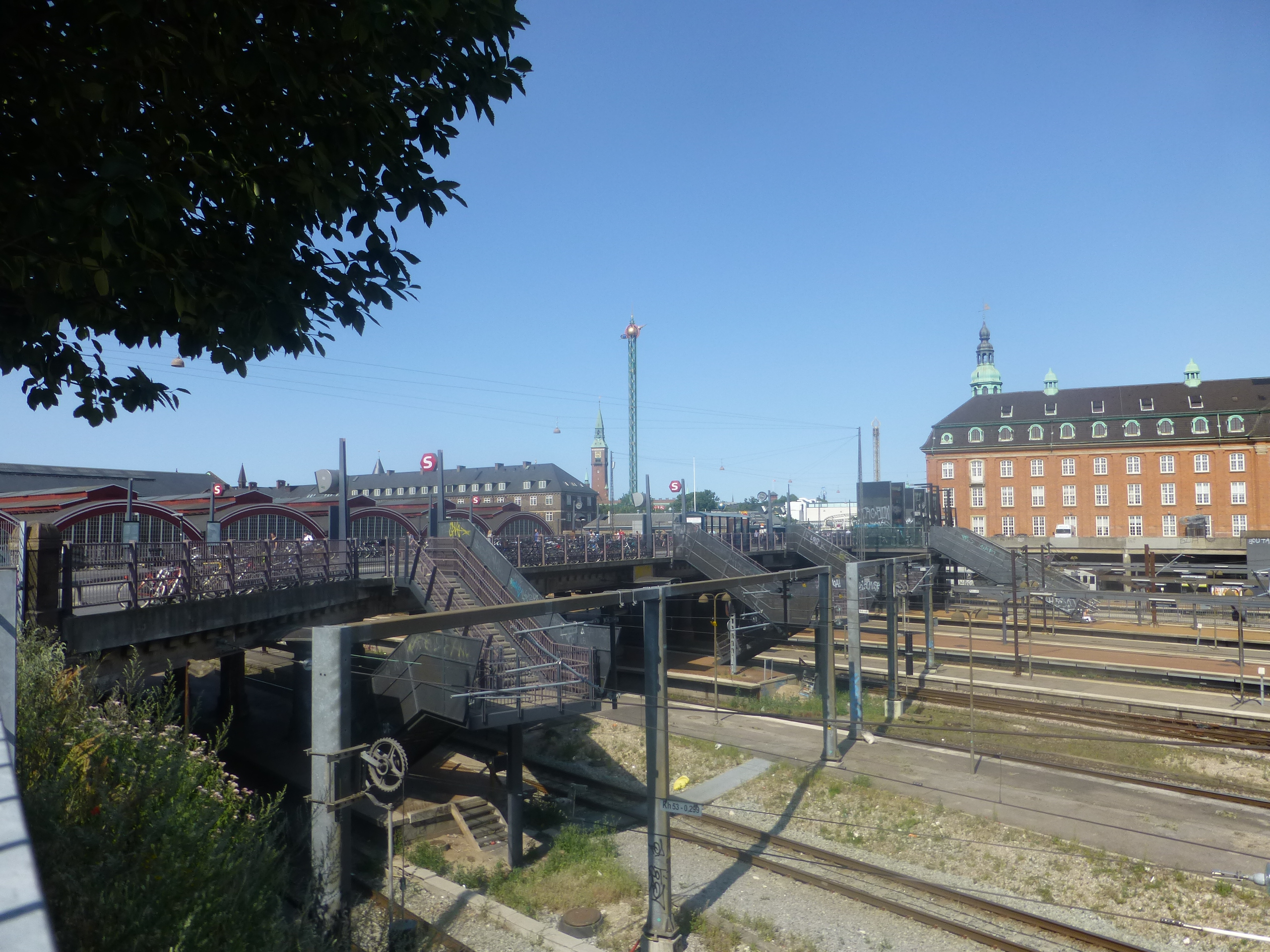 The bridge Tietgensbroen at Copenhagen Central Station.